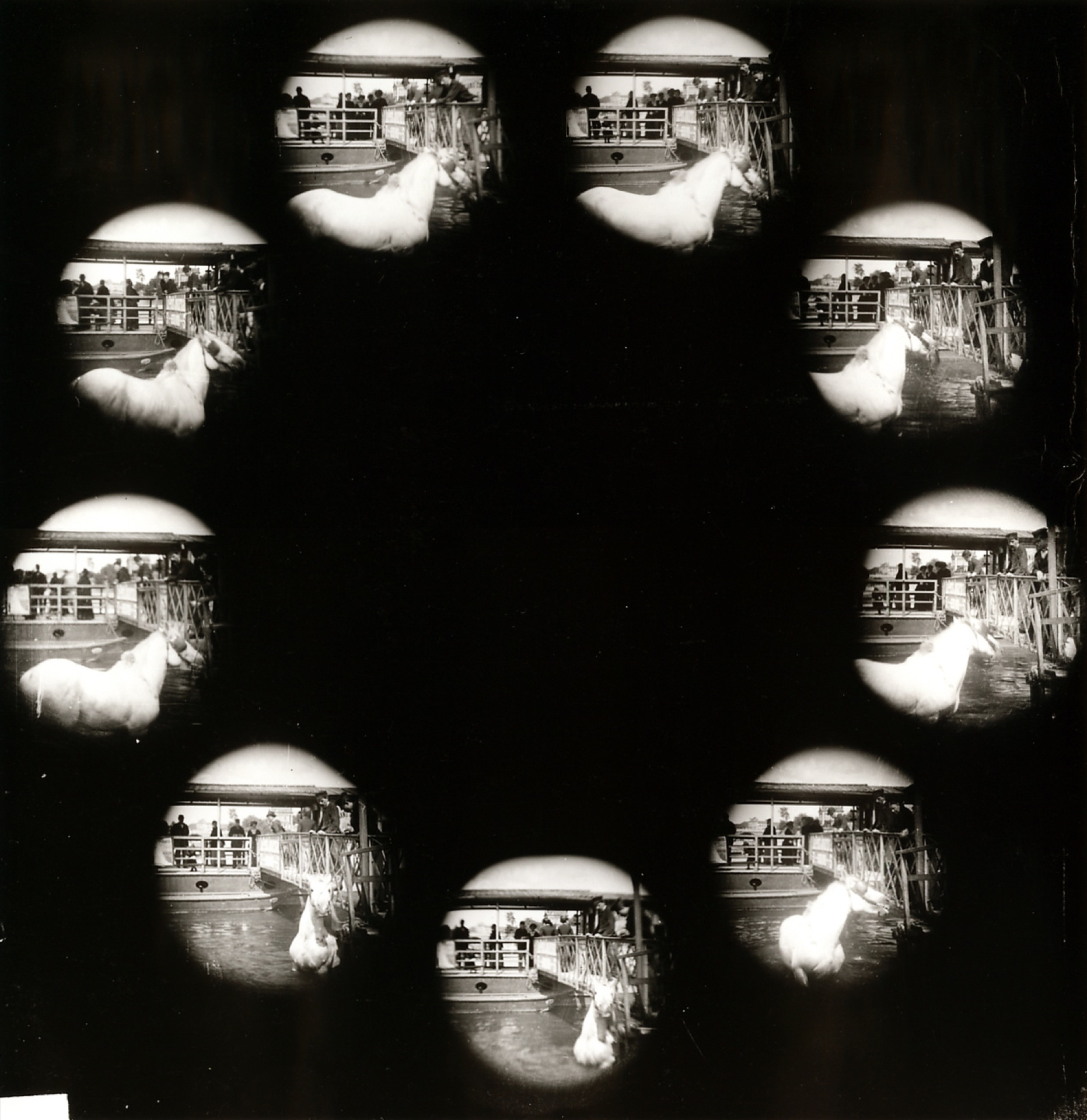 Albert Londe, cheval tombé à l'eau, chronophotographie, 1883 (coll. SFP).